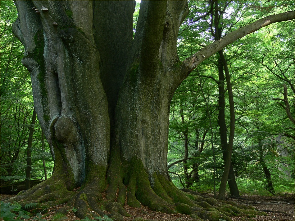 Rotbuche (Fagus sylvatica) als Büschelbuche gesetzt mit Namen Drillingsbuche im Urwald Sababurg, 8,83 m Stammumfang gemessen 2005